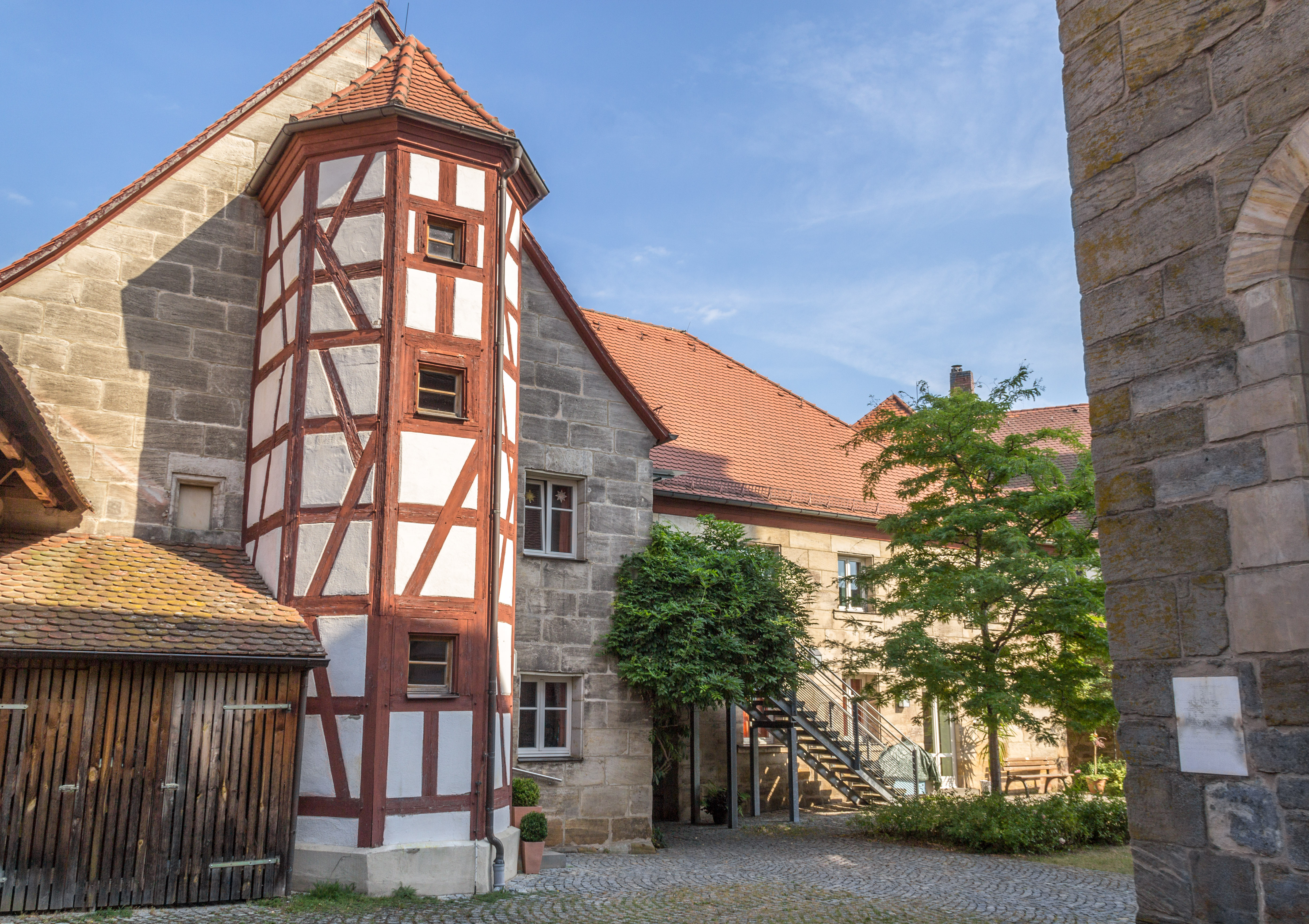 Evangelisch-lutherische Pfarrkirche St. Leonhard, LeinburgThis is a photograph of an architectural monument.